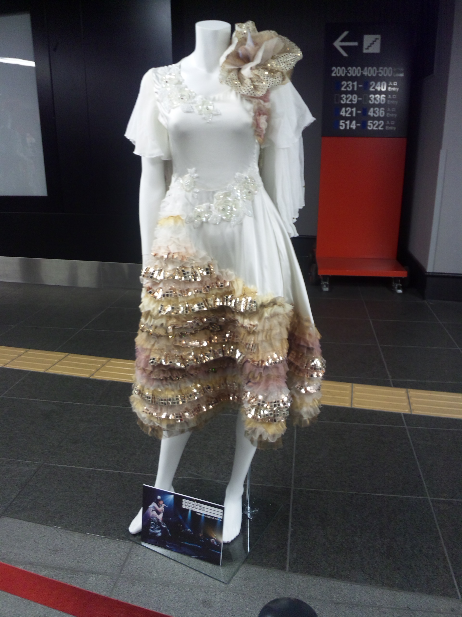 アニメロミックス Presents Minori Chihara Birthday Live 2012 supported by JOYSOUND 衣装展覧会より 『Minori Chihara 1st Live Tour 2008 〜Contact〜』の衣装。